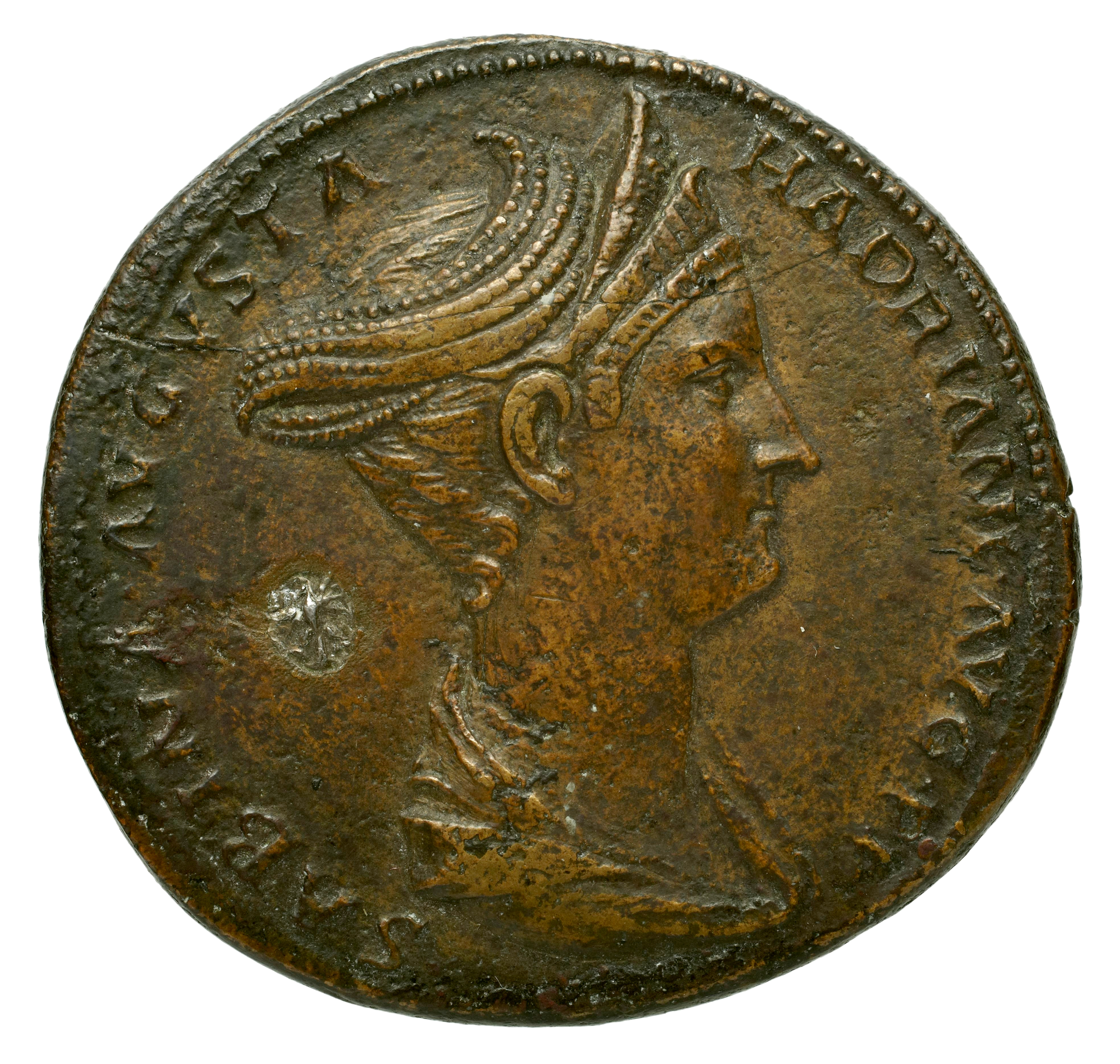 Sesterce de Sabina, femme d'Hadrien. Avers : SABINA . AVGVSTA - HADRIANI AVG . P P. Buste diadémé et drapé de Sabine à droite, chevelure en chignon. Bronze ou laiton 28,06 gr. diamètre 33 mm. Rome, 132-138 ap.JC. Collection BnF : IMP-1284 (un poinçon à l'aigle d'origine moderne dans le champ).